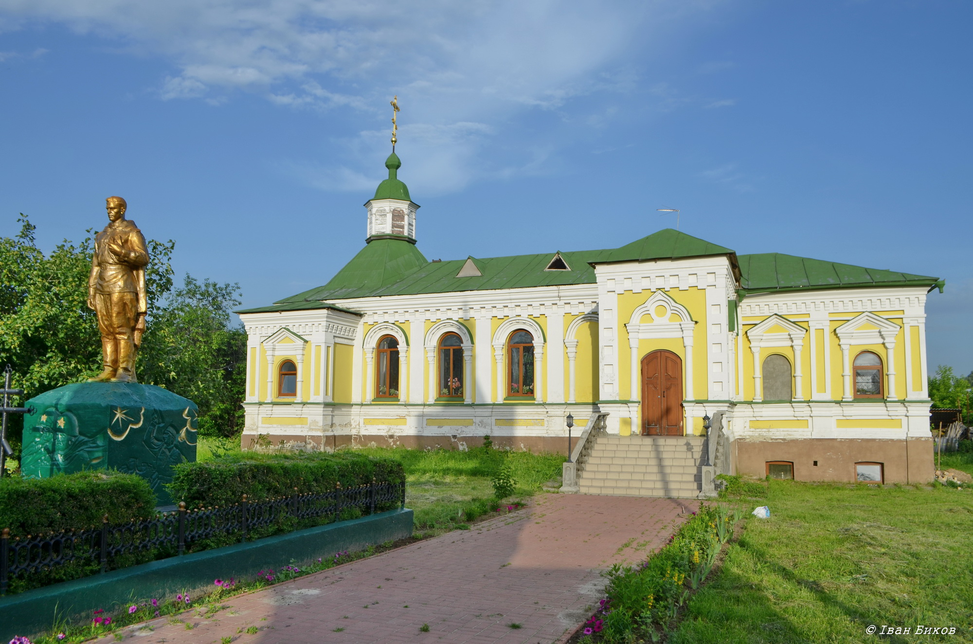 Могила невідомого червоноармійця, розстріляного денікінцями у 1918 році, село Гатне, біля старої школи